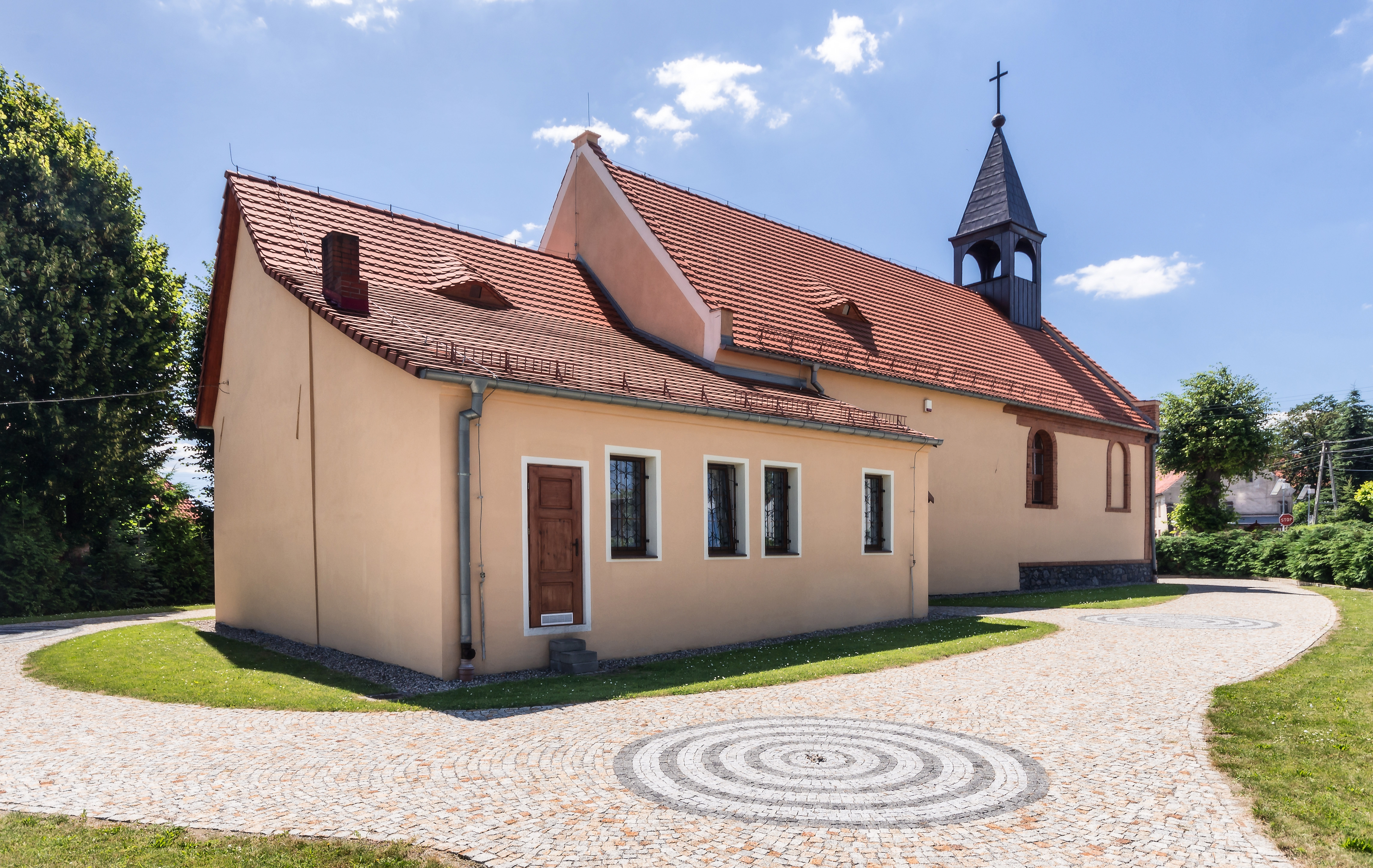 Piskorzów - rzymskokatolicki kościół filialny pw. św. Jana Nepomucena, XVI, 1730, 1921